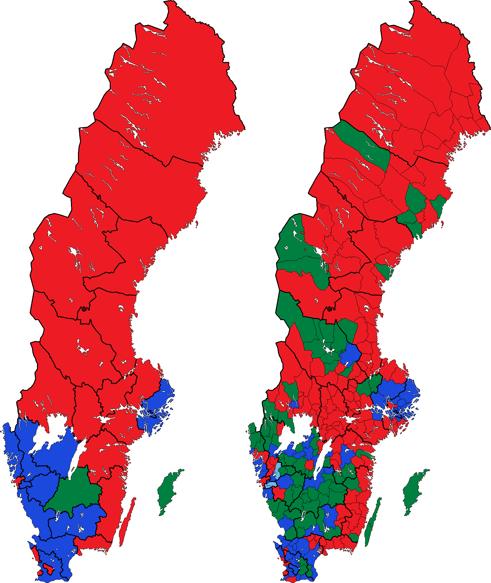 Största parti inom det ledande blocket i samtliga valkretsar och kommuner i riksdagsvalet 1985. Moderata samlingspartiet, Folkpartiet och Centern har räknats till det borgerliga blocket medan Arbetarpartiet-Socialdemokraterna och Vänsterpartiet kommunisterna har räknats till det socialistiska blocket. Partier därutöver räknas som egna block. Socialdemokraterna Moderaterna Centern Folkpartiet